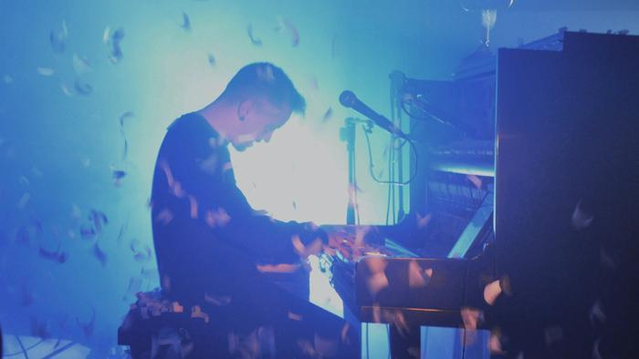 Concerto alla 'Miniera delle Arti' Ascoli